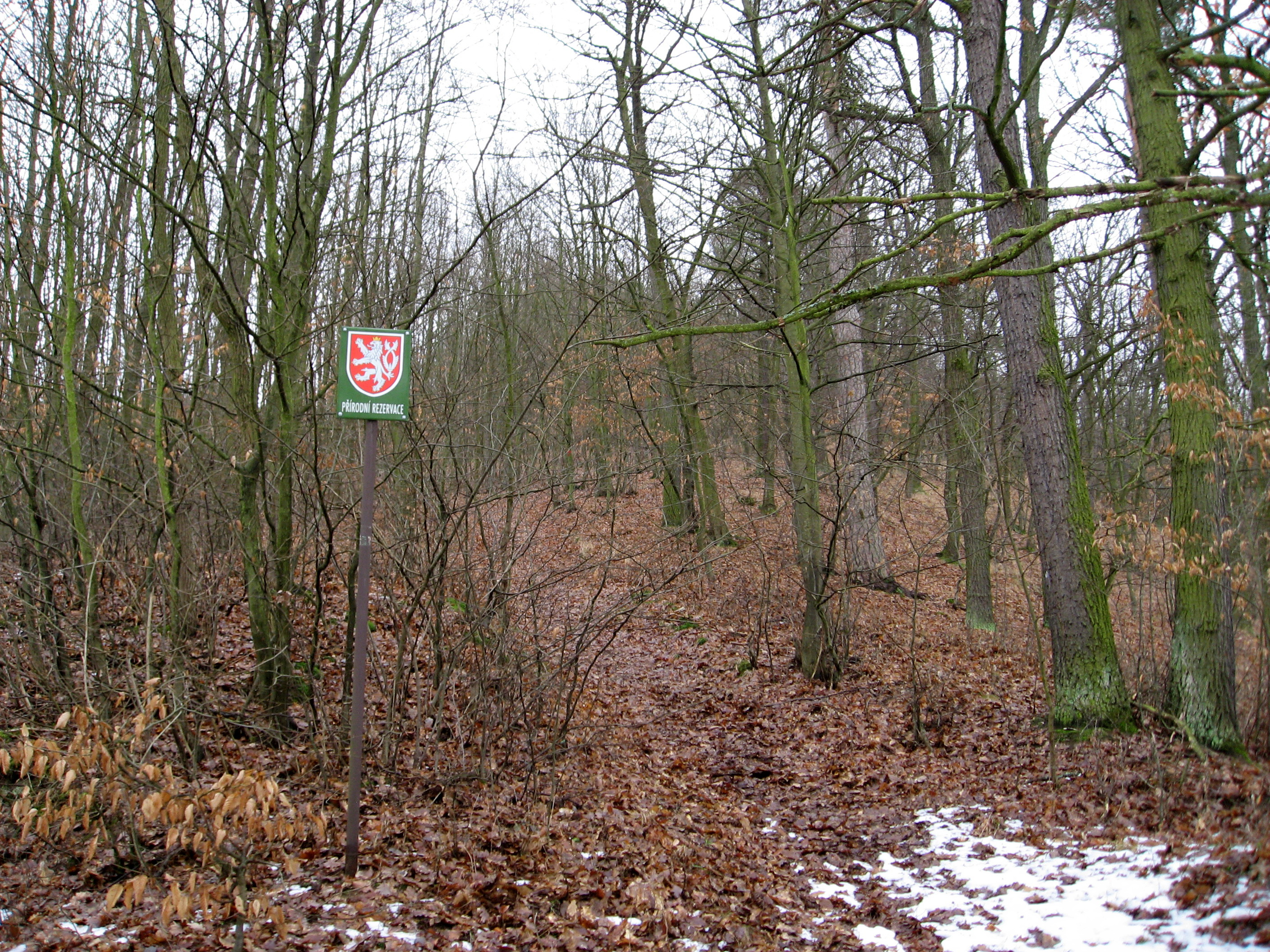 Přírodní rezervace Břenčák